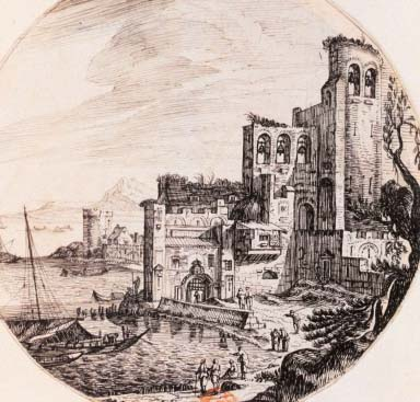 Silvestre, Israël (1621-1691). La Major de Marseille